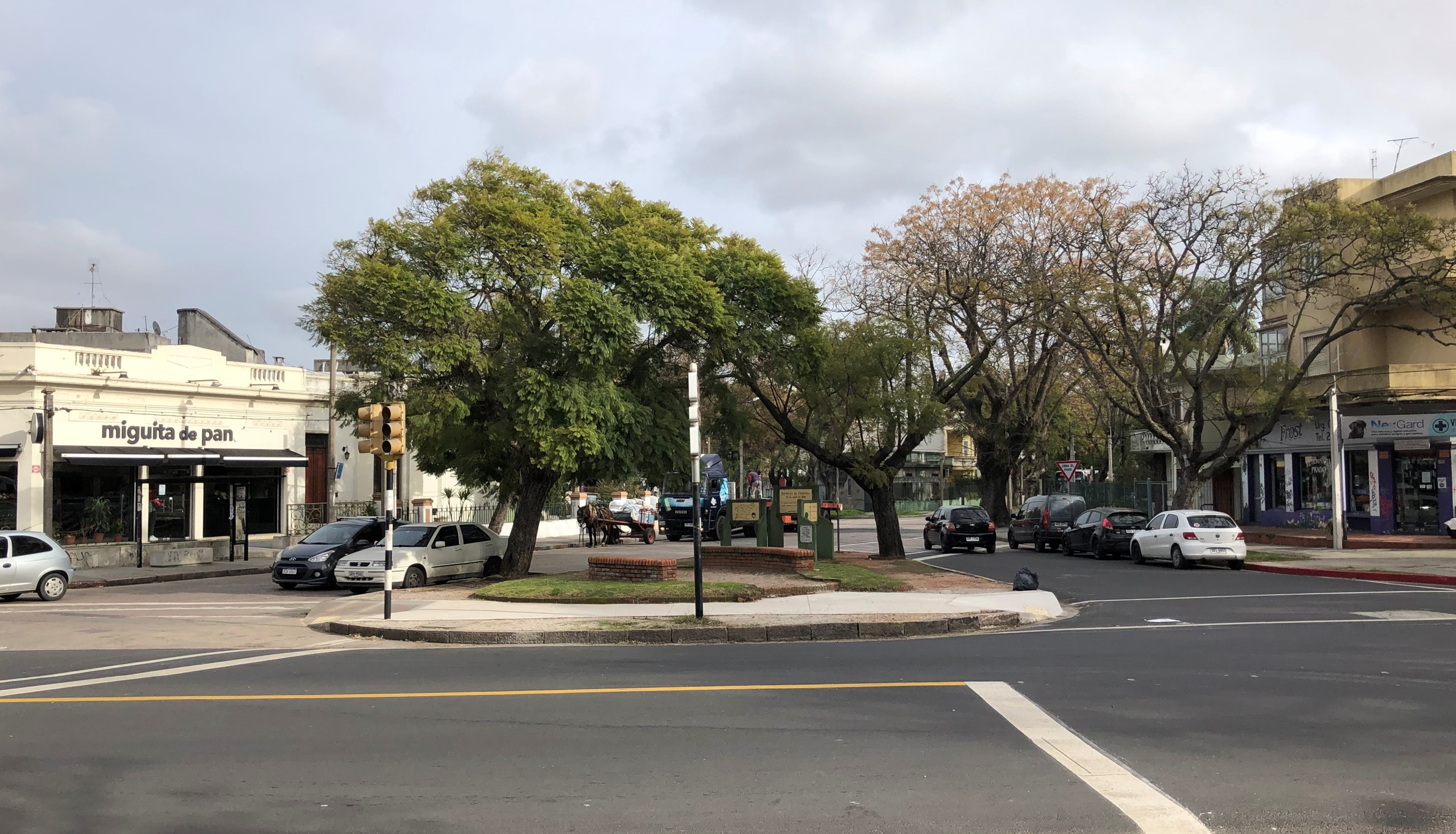 Vista de la Plaza República de Eslovenia en el barrio Prado de Montevideo.